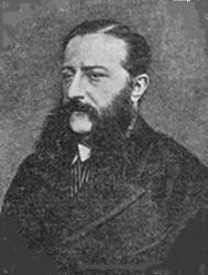 e scema come img 1800 senatore Clemente Corte pubblico dominio